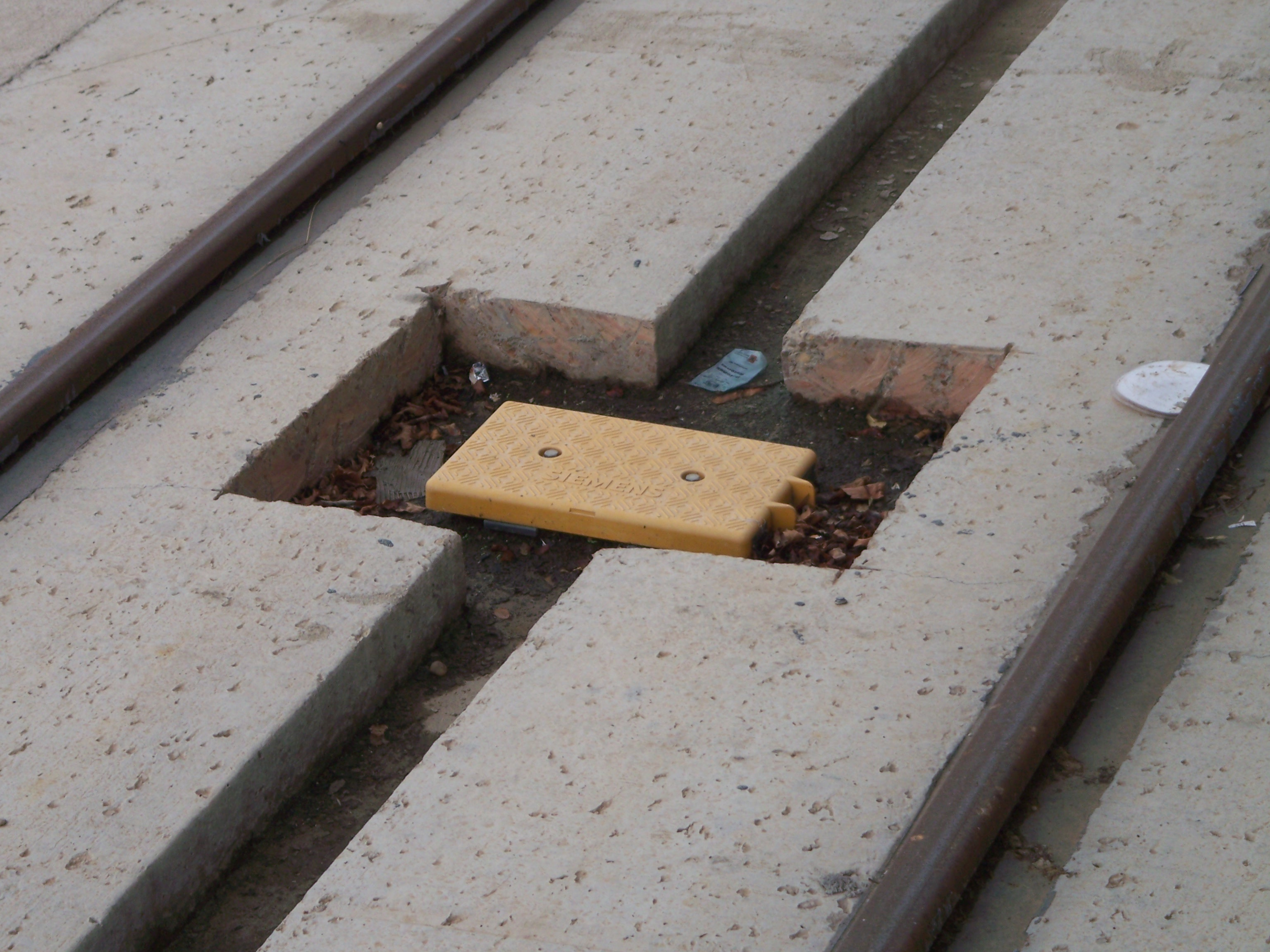 Eurobalise im Bahnhof von Toledo (Spanien)